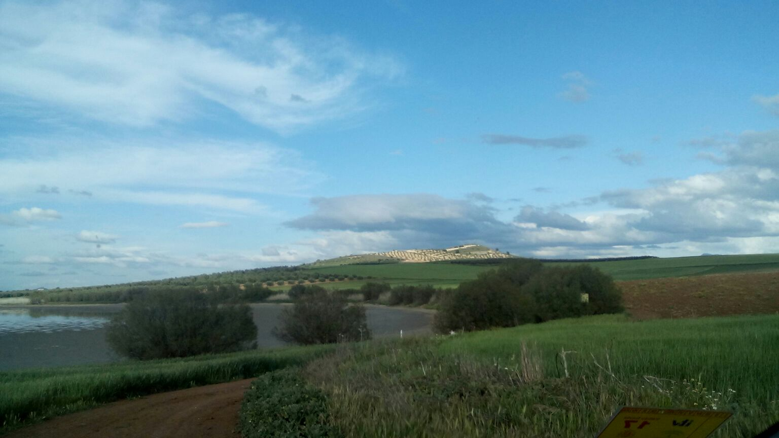 Laguna Salada. Campillos